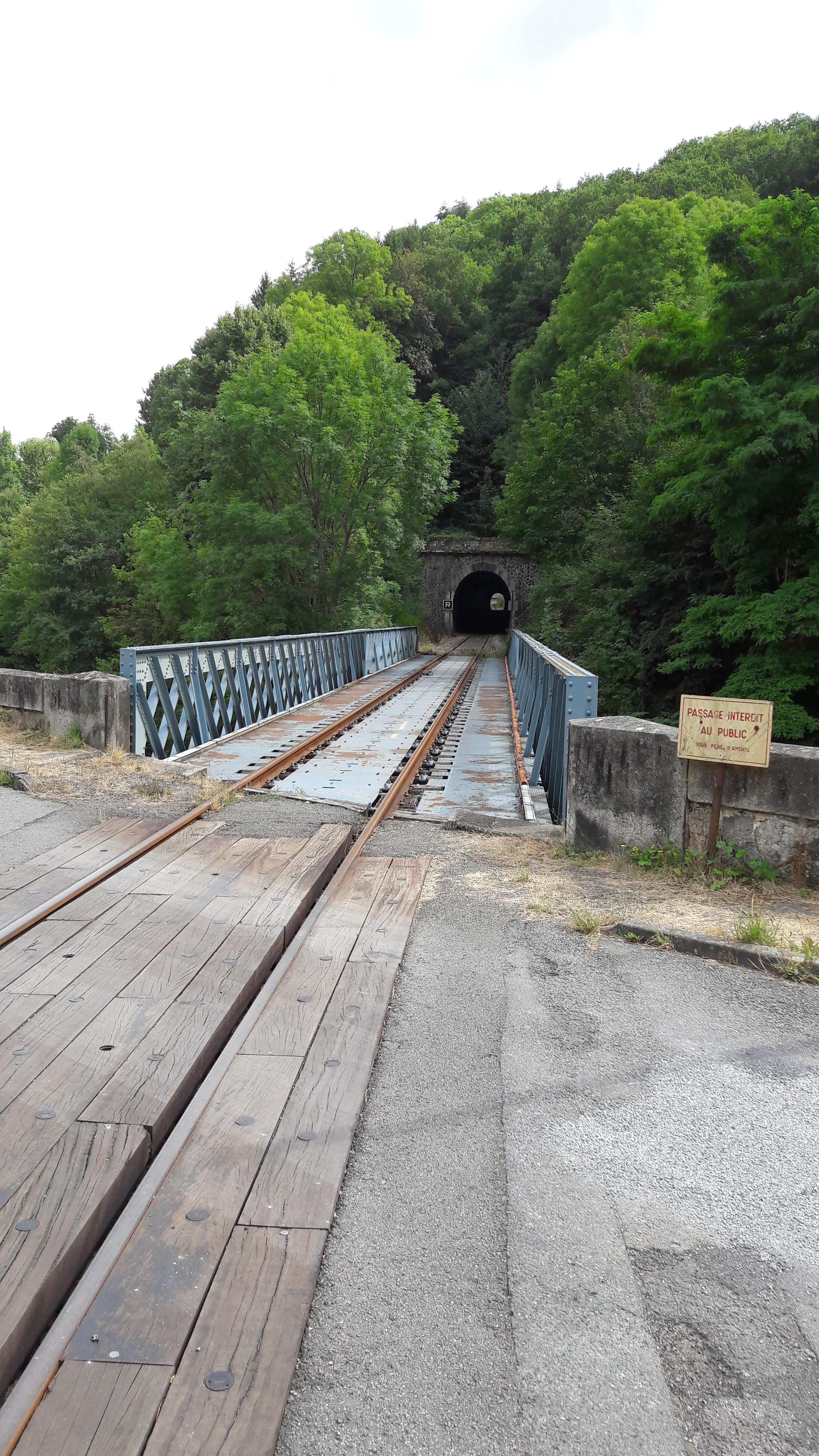 Traversé du pont d'Aubusson sur la Creuse et du tunnel de la ville d'Aubusson